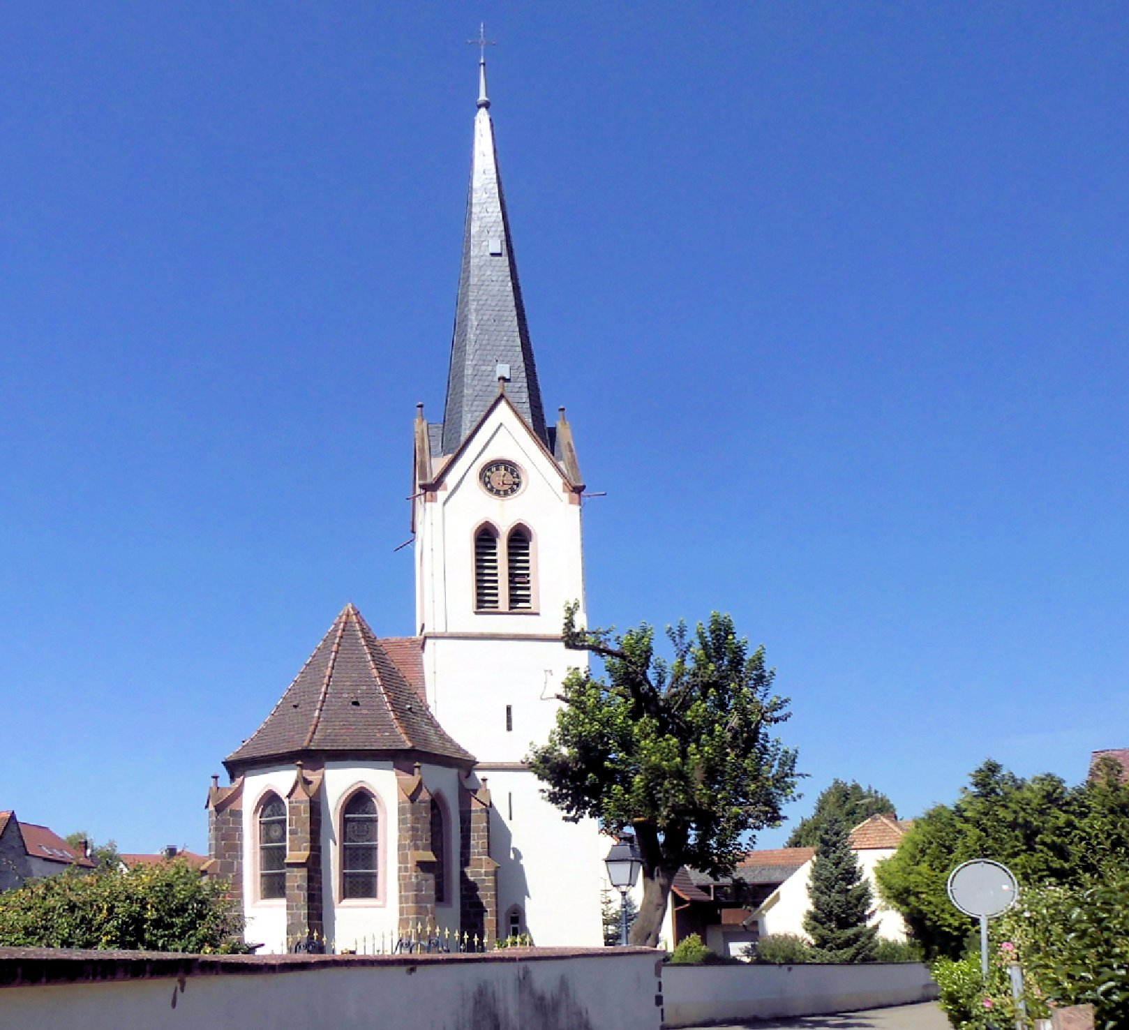 Südostseite der evangelischen Kirche in Bickensohl, Stadt Vogtsburg im Kaiserstuhl